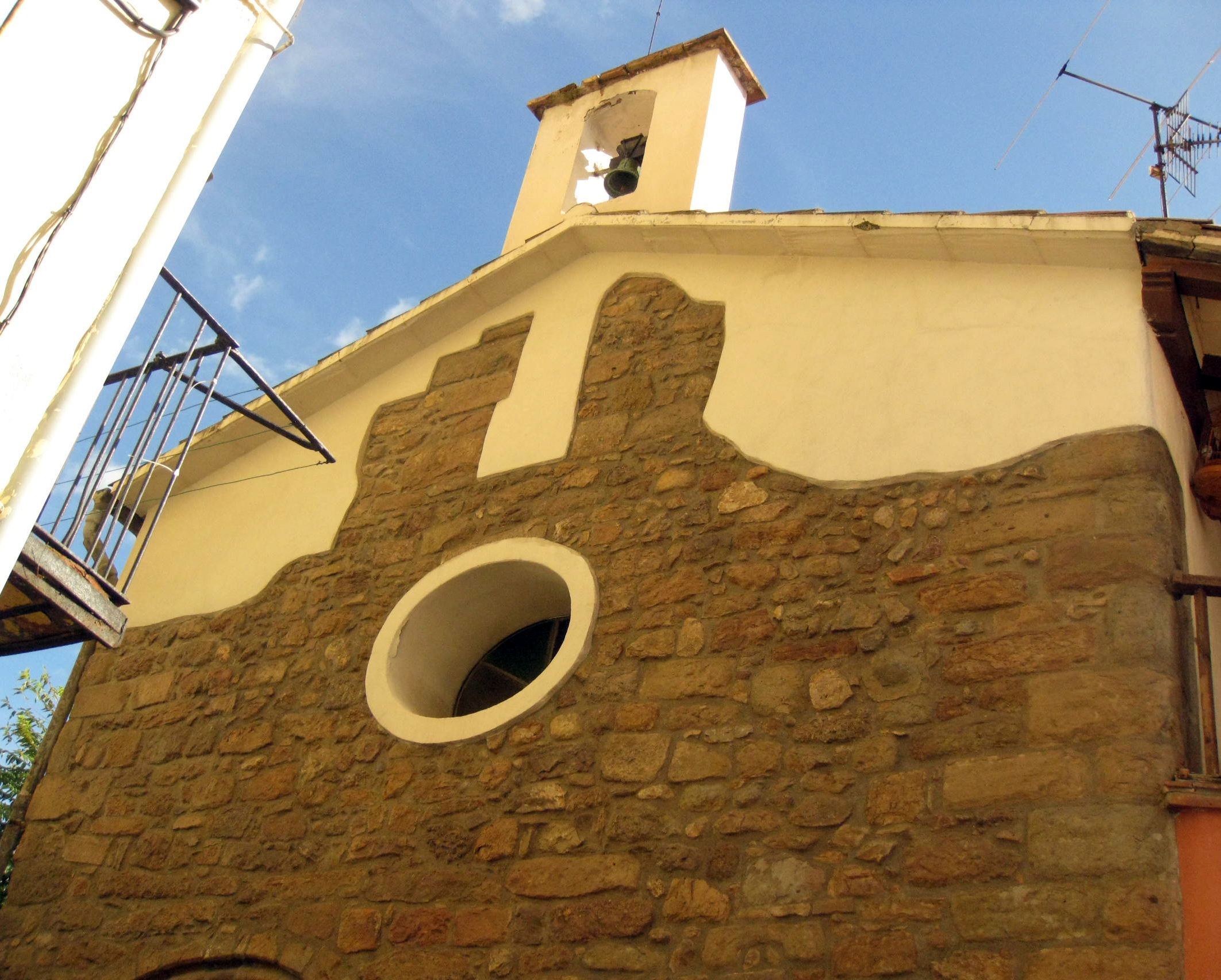 Capella de la Pietat (Berga) Object location42° 06′ 18.9″ N, 1° 50′ 49.13″ E The above coordinates are missing from linked Wikidata item M28014139. Click here to copy it